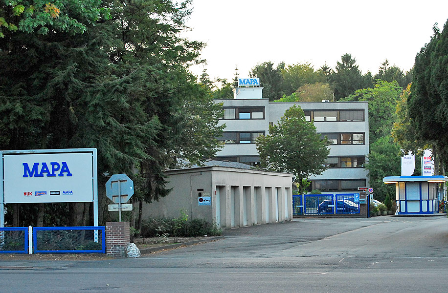 Zeven Aspe Mapa